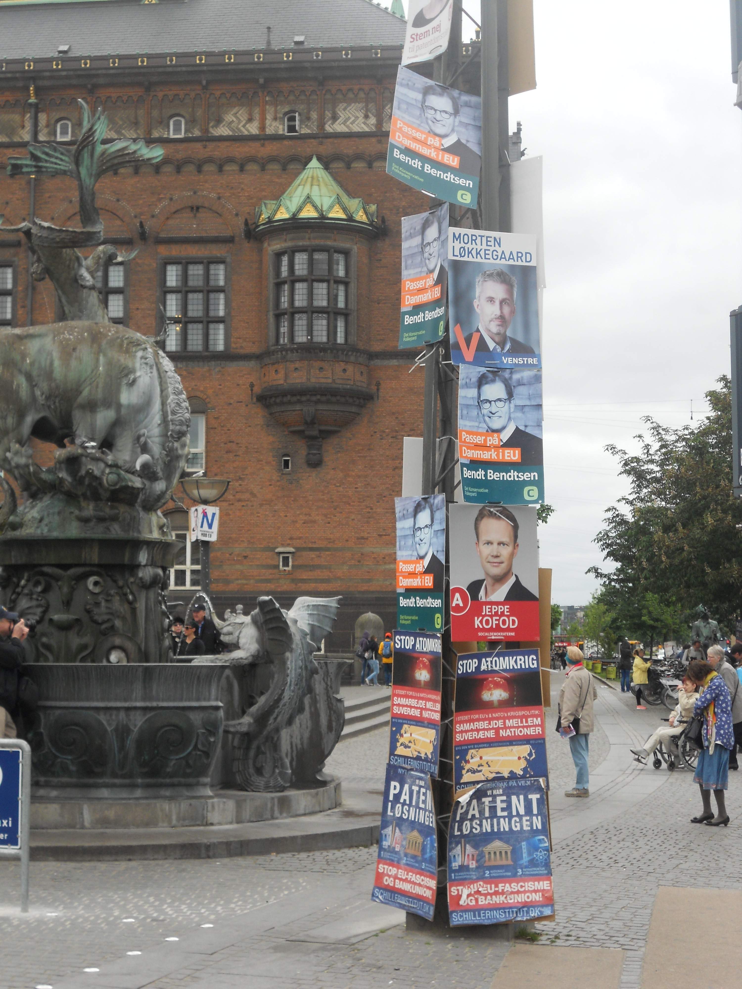 Photographie prise fin mai 2014 à Copenhague, dans le contexte des élections européennes.